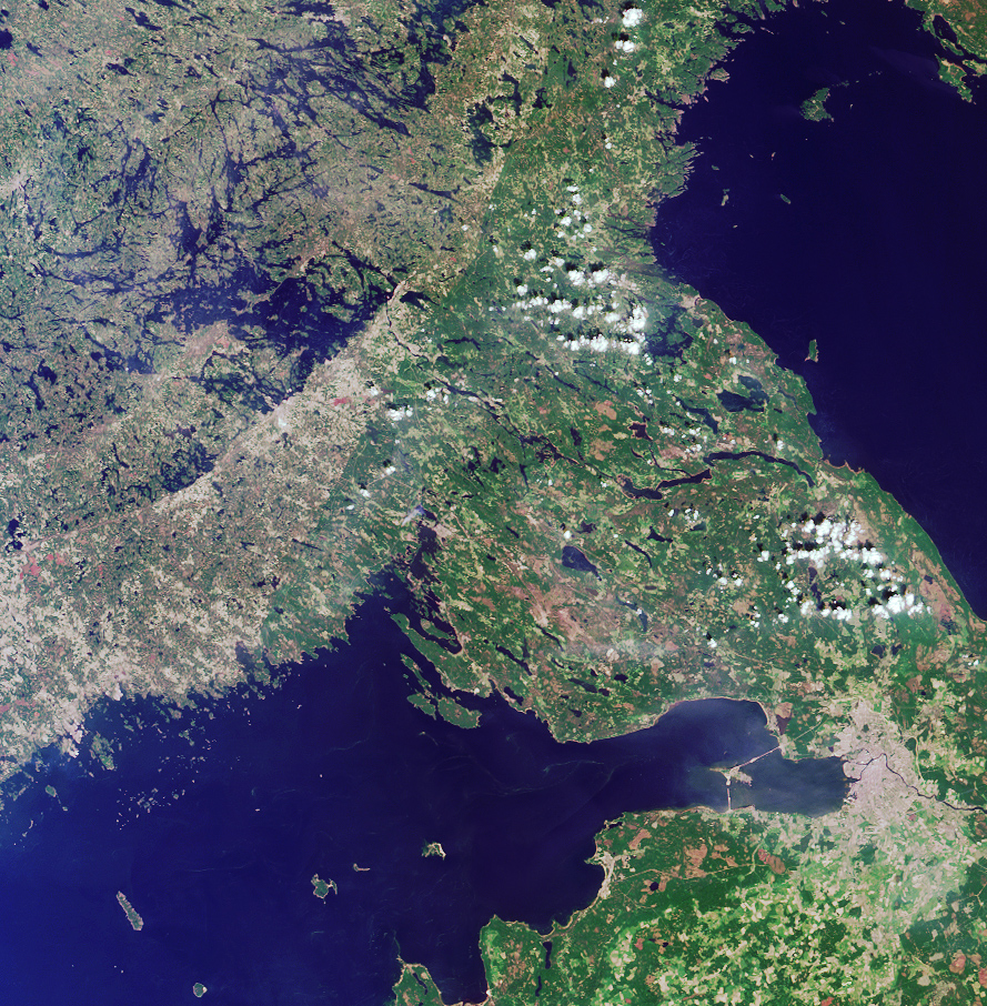 NASA-Aufnahme: Finnischer Meerbusen, Sankt Petersburg, Ladogasee